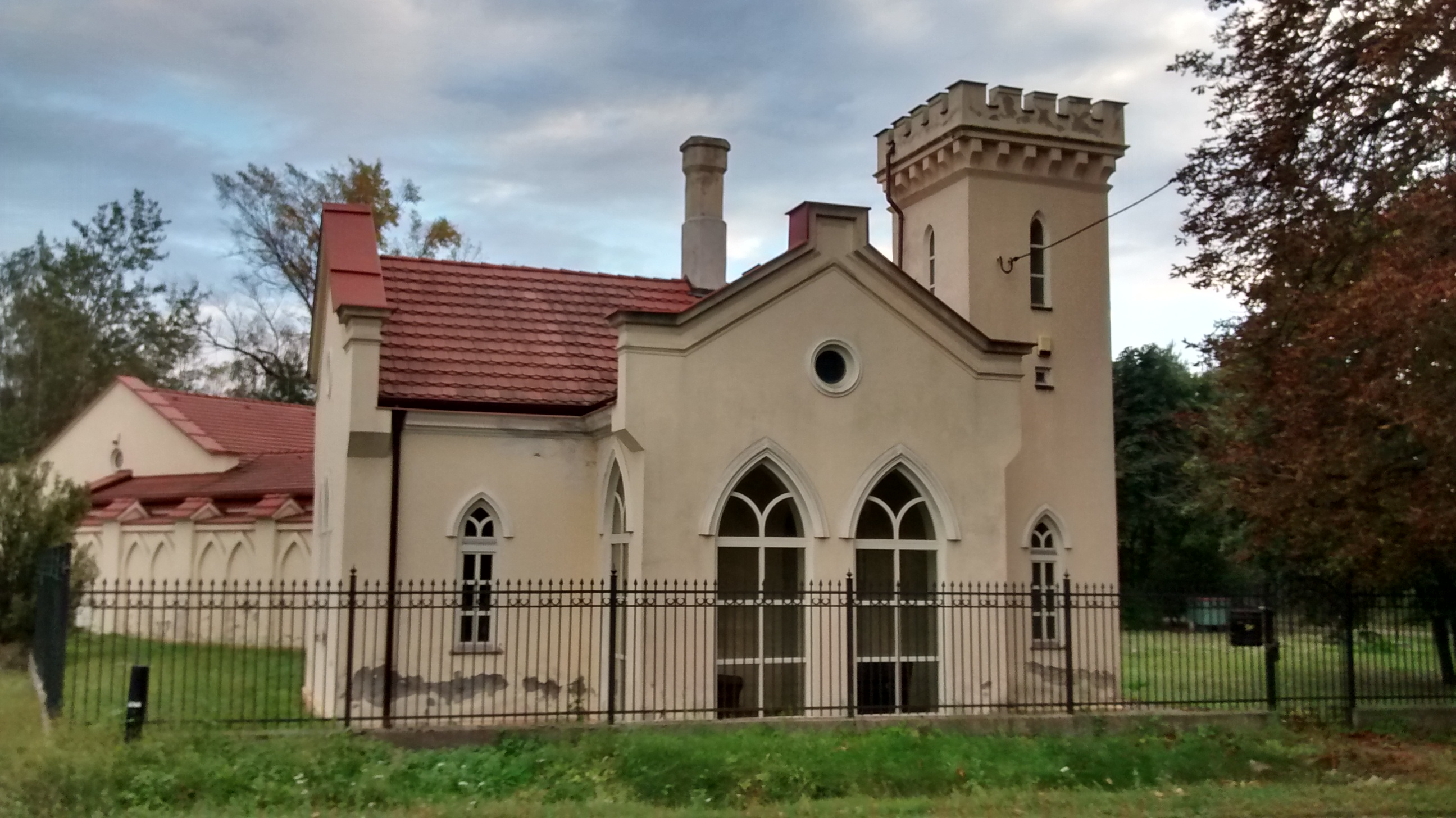 Pałacyk Łowczego wybudowany w 1820 r.